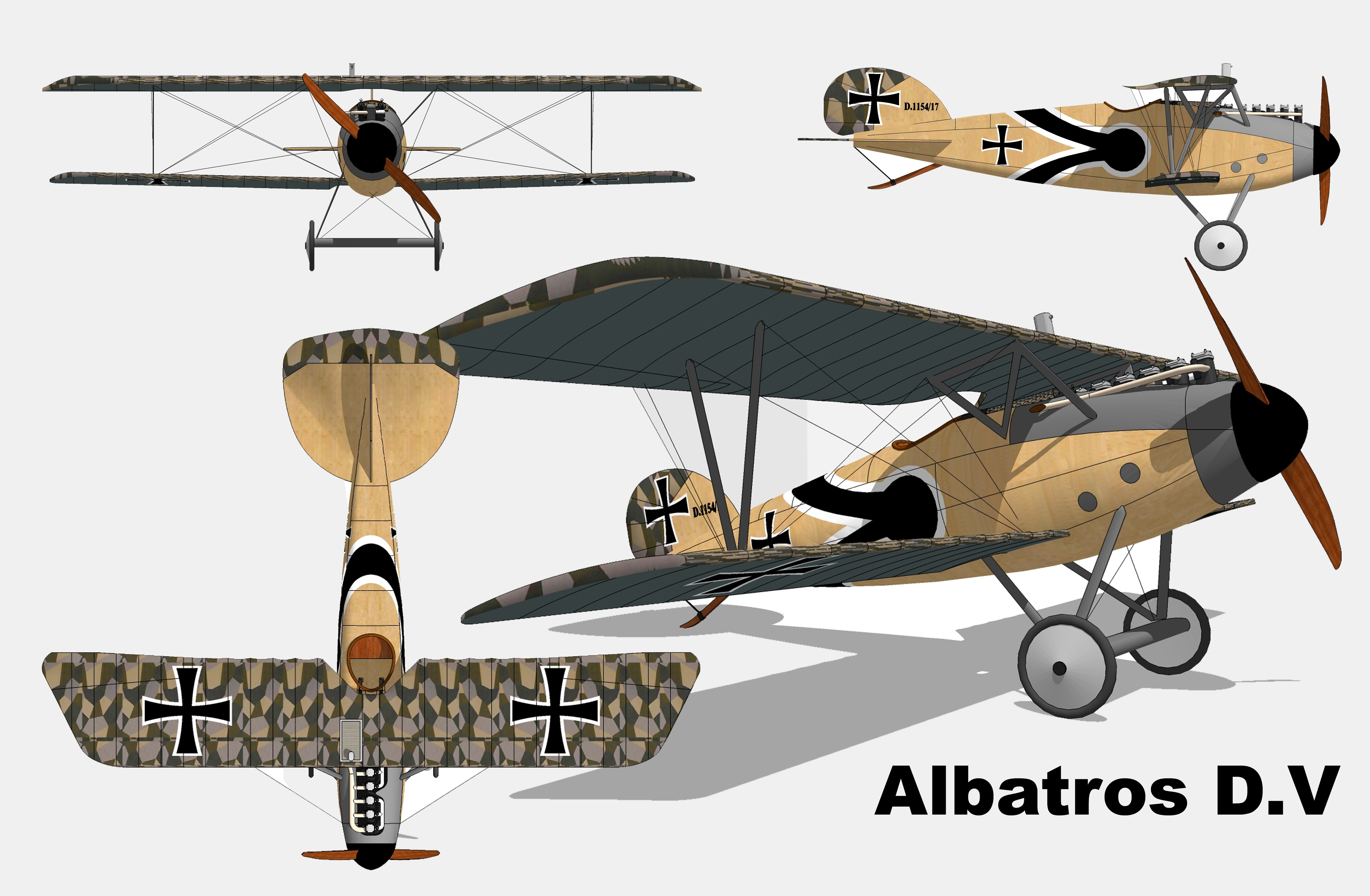 Plan 2 vues de l'Albatros D.V